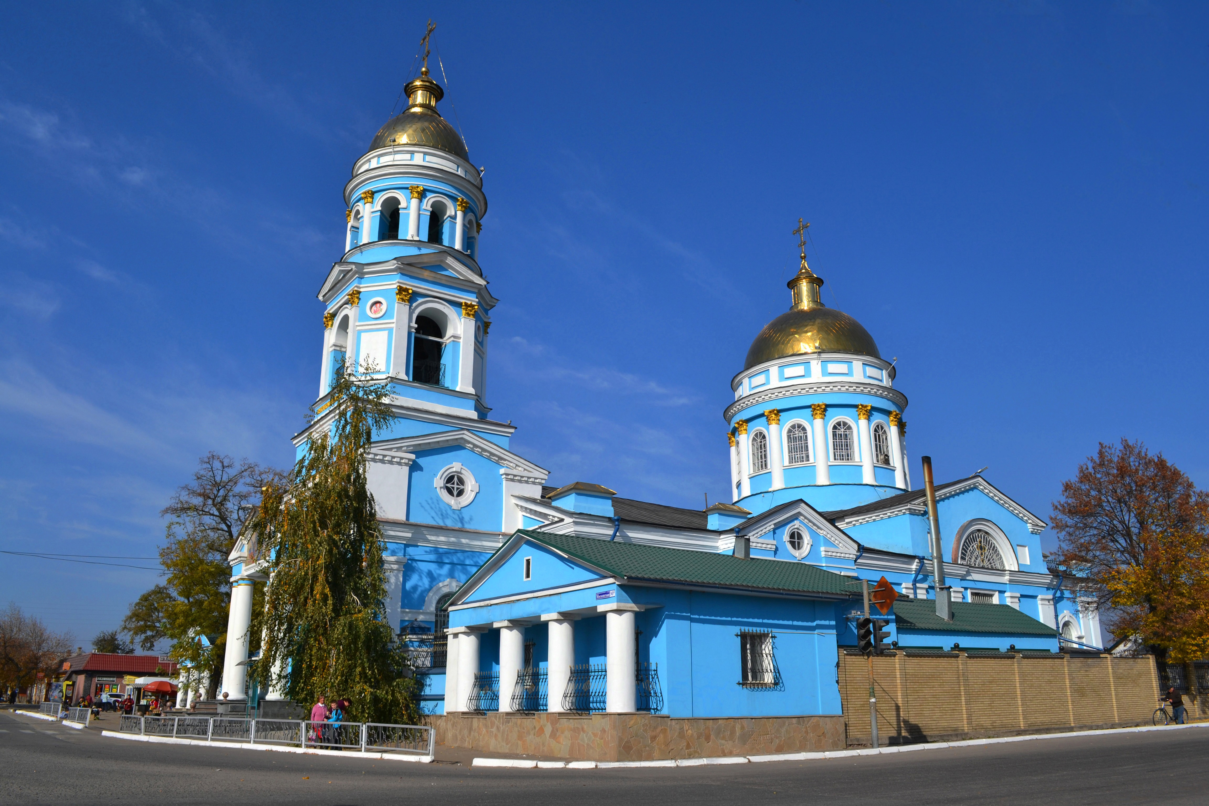 Вознесенська церква з дзвіницею (мур.), Шзюм, вулиця Комсомольська,2